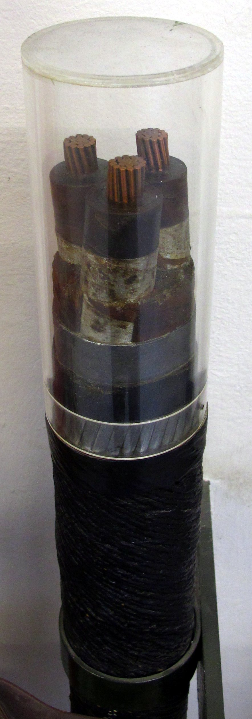 Höchstätter-Kabel für 30 kV in Dreileiterausführung. Die Erfindung der Adernschirmung 1913 mit metallisierten Papier von Martin Höchstätter (1883–1973) ermöglichte bei Papier-Masse-Kabeln im Hochspannungsbereich durch Steuerung der elektrischen Feldverteilung in der Isolationsschicht Betriebsspannungen über 15 kV. Noch heute werden Hochspannungskabel (Erdkabel) nach diesen Verfahren gebaut, allerdings ist das Papier durch andere Isolationsstoffe abgelöst worden. Hersteller: Felten & Guilleaume Carlswerk AG, Köln, 1929